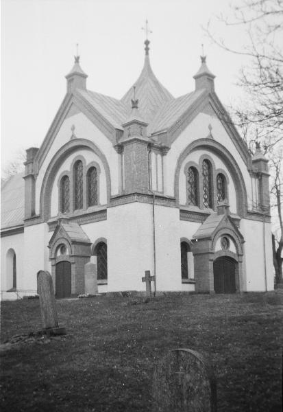 Kyrkans västra del från nordväst. Före restaurering. Kategori: (01) Exteriörer, detaljerKyrkans västra del från nordväst. Före restaurering.